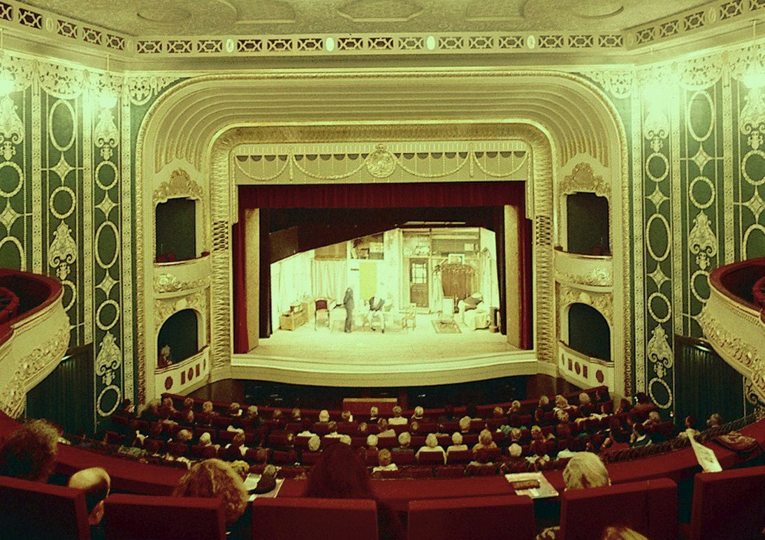 Zuschauerraum im Kurtheater Bad Kissingen